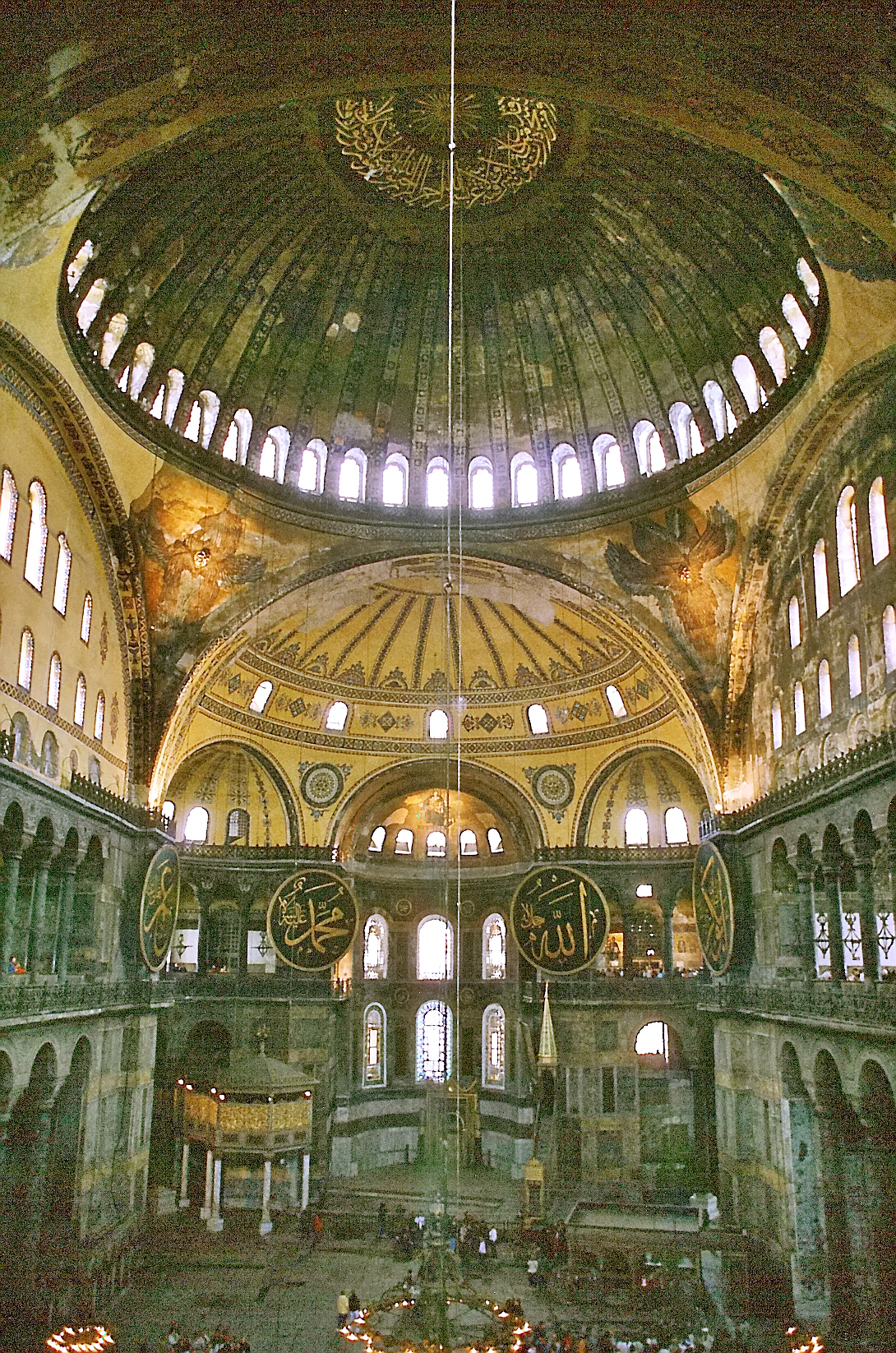 Blick in das Hauptschiff der Hagia Sophia von der Galerie